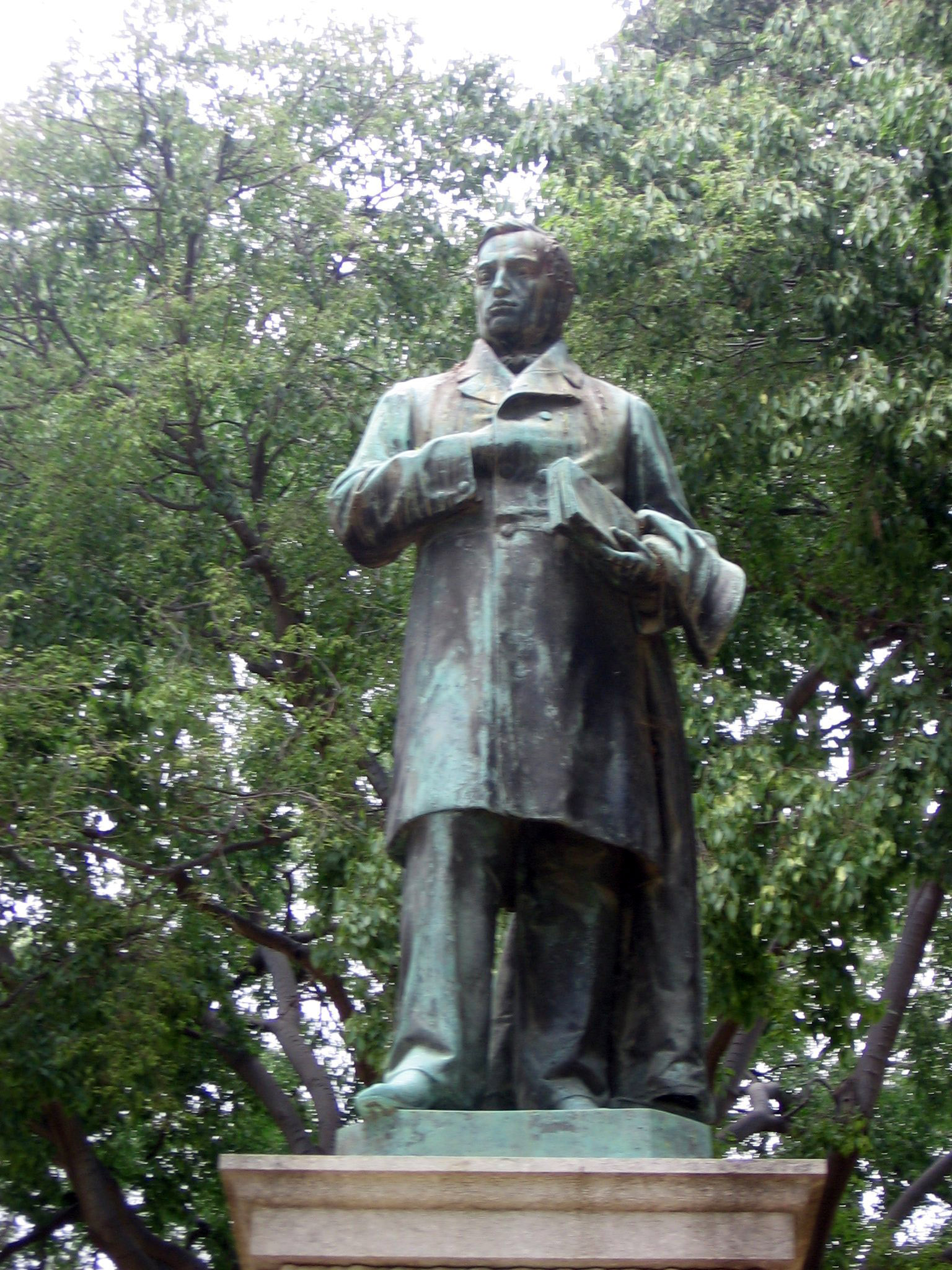 Monumento a Bonaventura Carles Aribau, Parque de la Ciudadela, Barcelona.